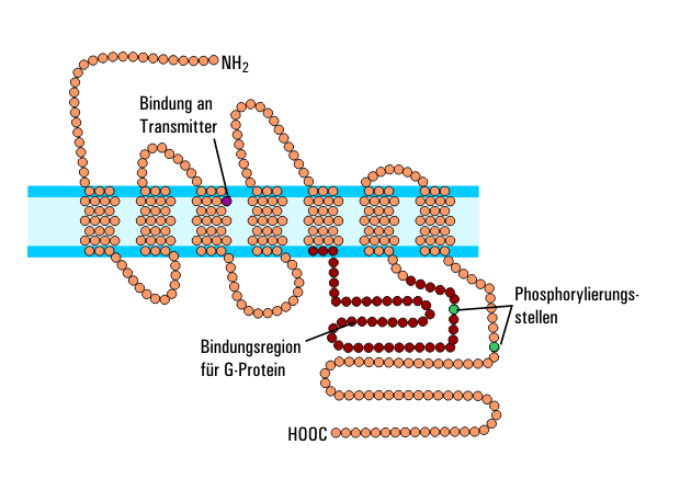 G-Protein-abhängiger Rezeptor, Schemazeichnung